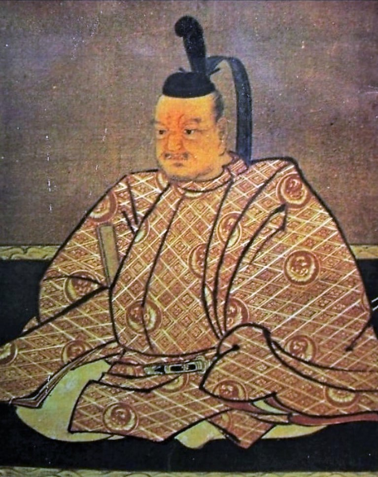 坂崎直盛(宇喜多詮家)の肖像。